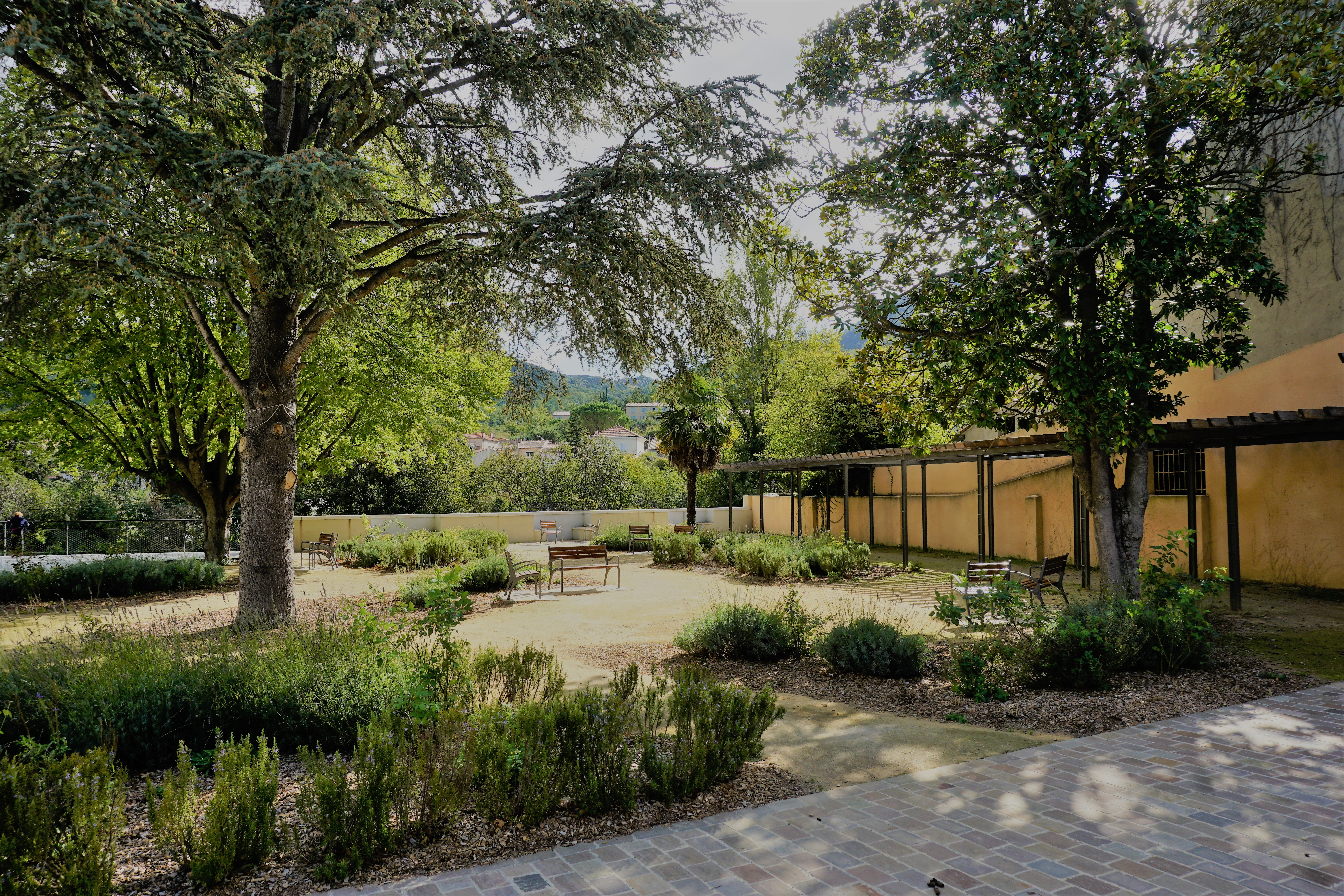 Quillan, Aude, Espace Charles-Marx. En hommage au médecin, résistant et homme politique luxembourgeois (1903-1946.